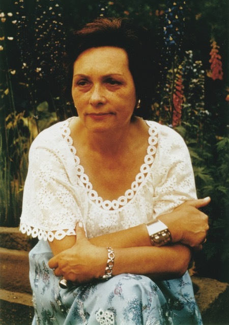 Barbara Bartos-Höppner im Garten